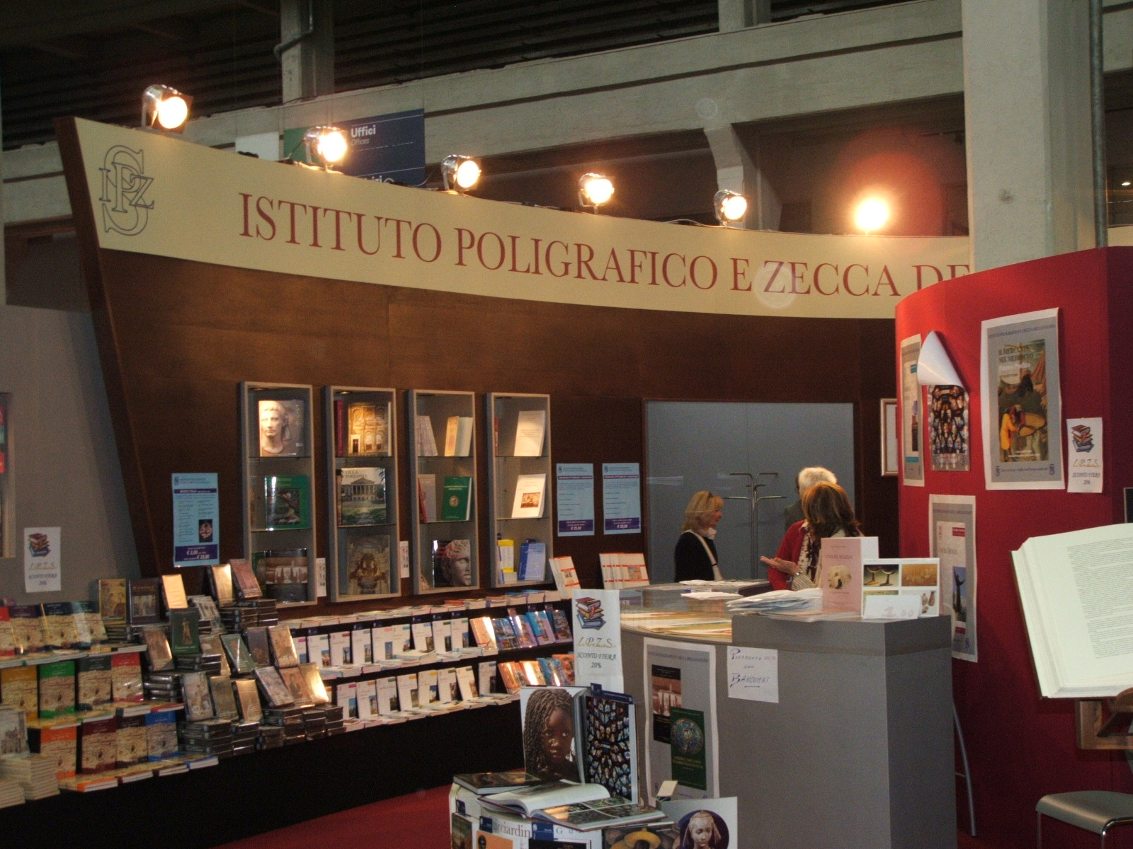 Torino Fiera internazionale del libro 2006